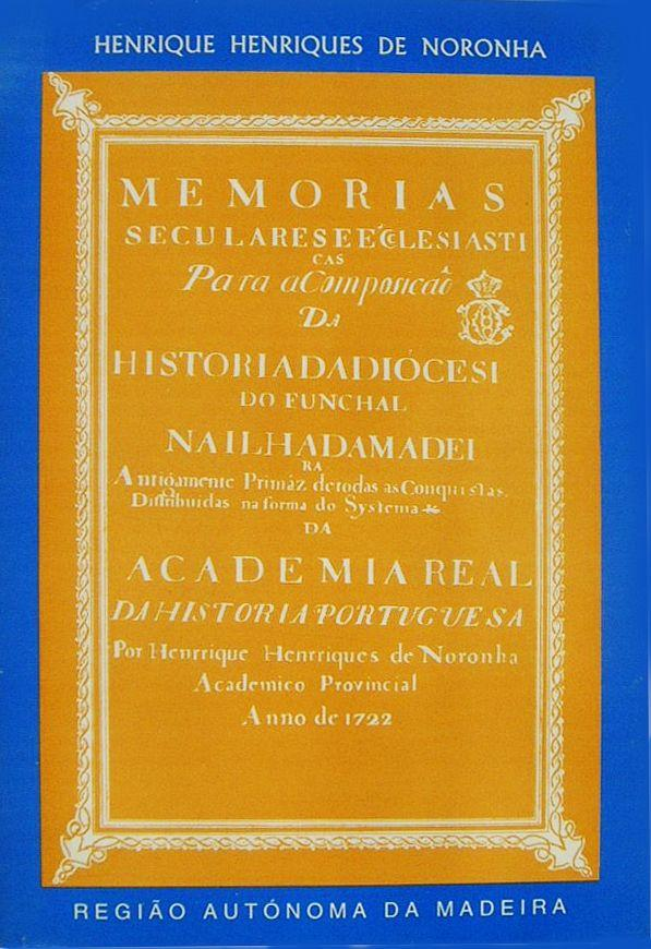 Henrique Henriques de Noronha, Memórias Seculares e Eclesiásticas...1722, CEHA, Funchal, 1997.